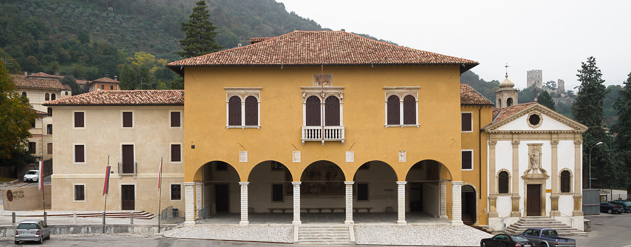 Visione Frontale del Museo della Battaglia di Vittorio Veneto.